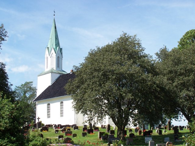 Kråkstad kirke i Ski kommune, Akershus, Norway